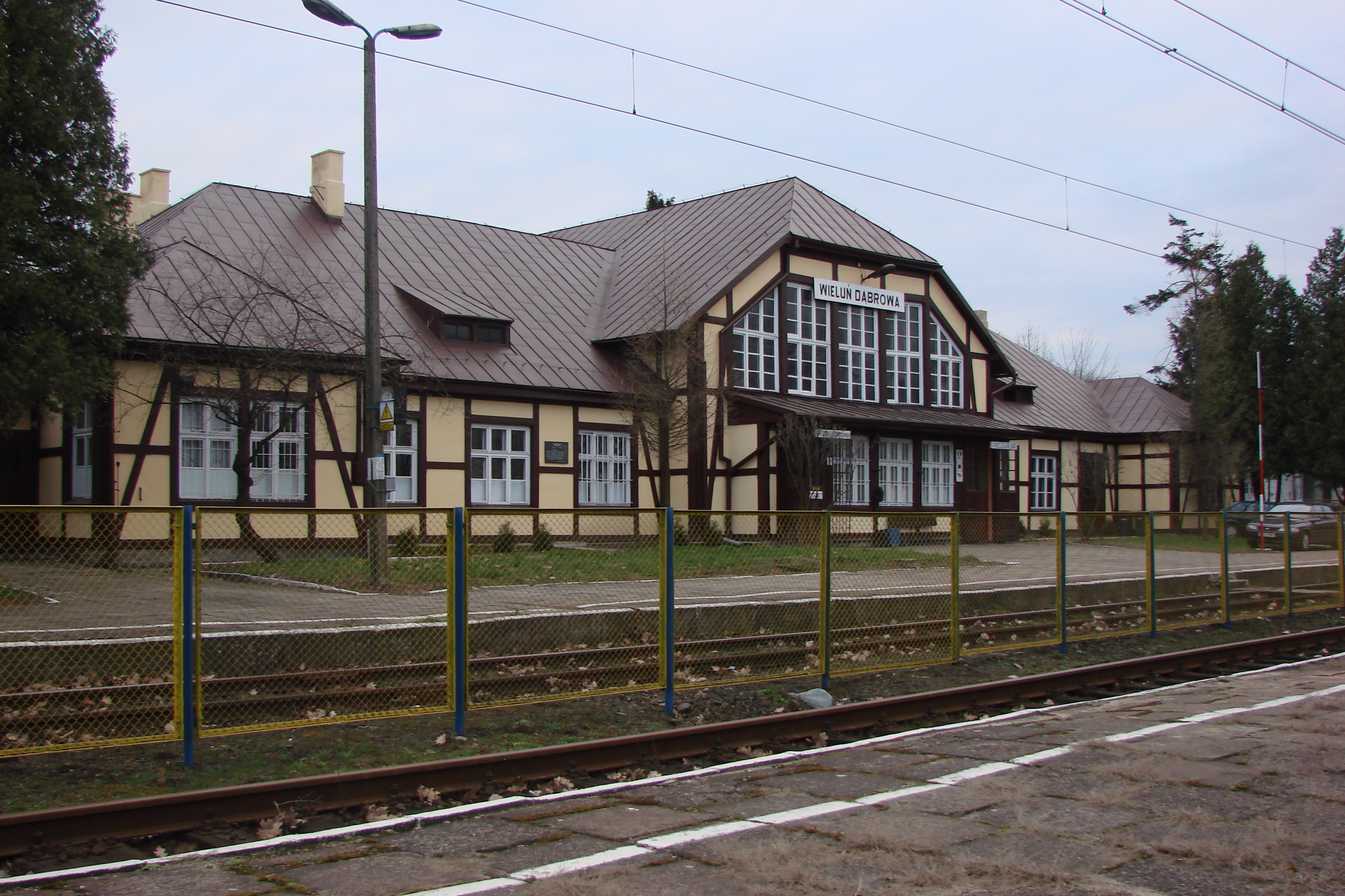 Stacja kolejowa Wieluń Dąbrowa